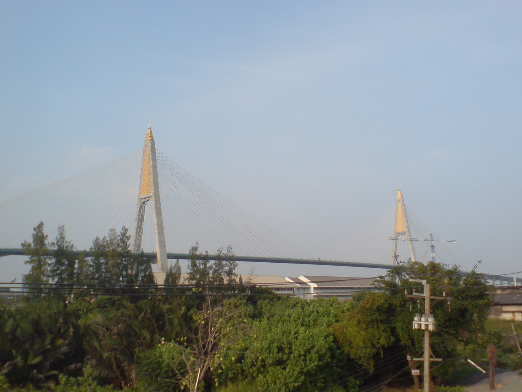 Kanchanaphisek Bridge